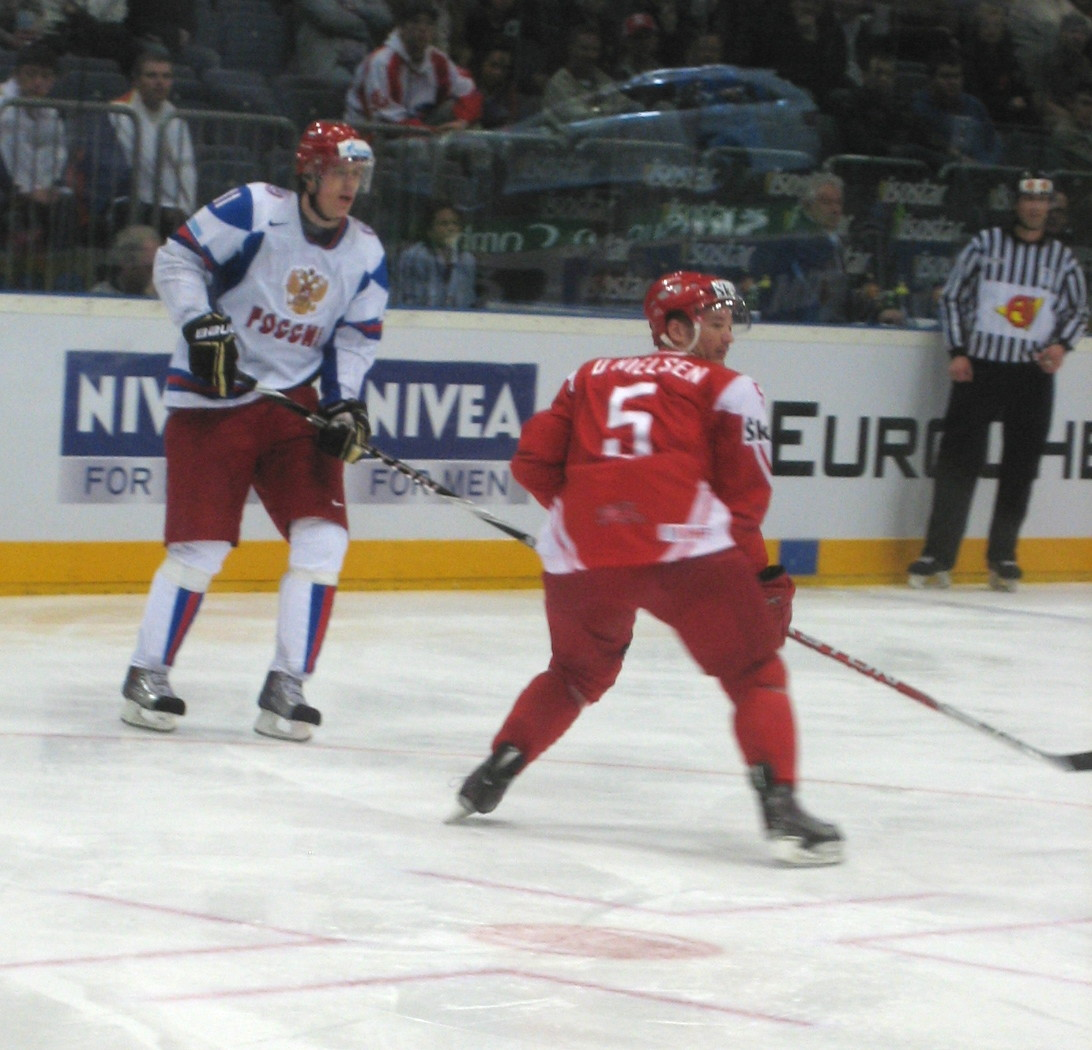 Jewgeni Malkin (links, Russland) und Daniel Nielsen (rechts, Dänemark) im neutralen Drittel, Spiel 35, Zwischenrundengruppe E, Eishockey-Weltmeisterschaft der Herren 2010 in der Kölnarena